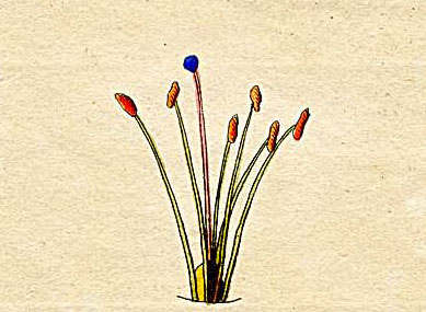 Ausschnitt (Klasse VI) aus Ehrets Tafel "Methodus Plantarum Sexualis"